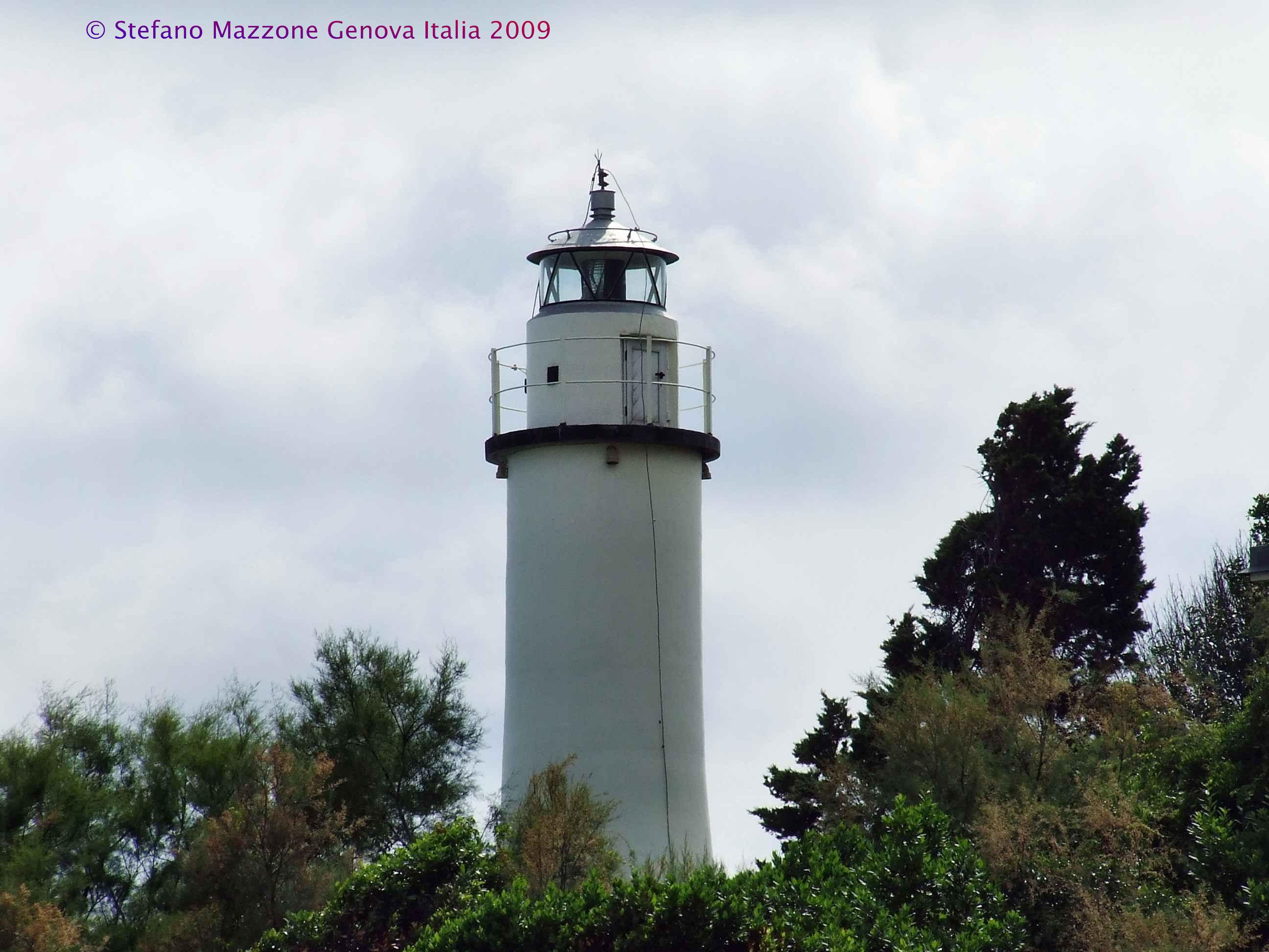 Faro Corso Italia Genova